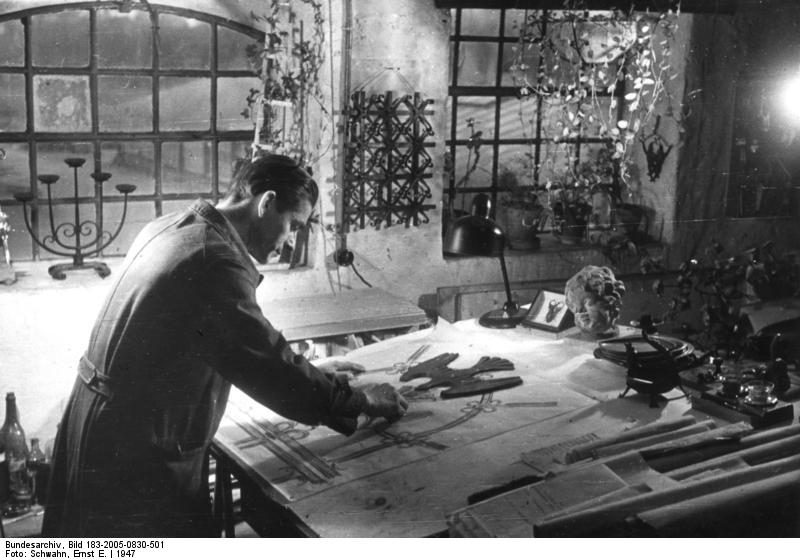 Berlin, Kunstschmied Fritz Kühn Illus Eisen in Künstlerhänden 1947. Beim Kunstschmied Fritz Kühn, Berlin. Der Meister am Zeichentisch beim Entwurf eines Gitters für ein Kirchenfenster. Fot. Schwahn 396-47 Abgebildete Personen: Kühn, Fritz Prof.: Kunstschmied, Fotograf, DDR